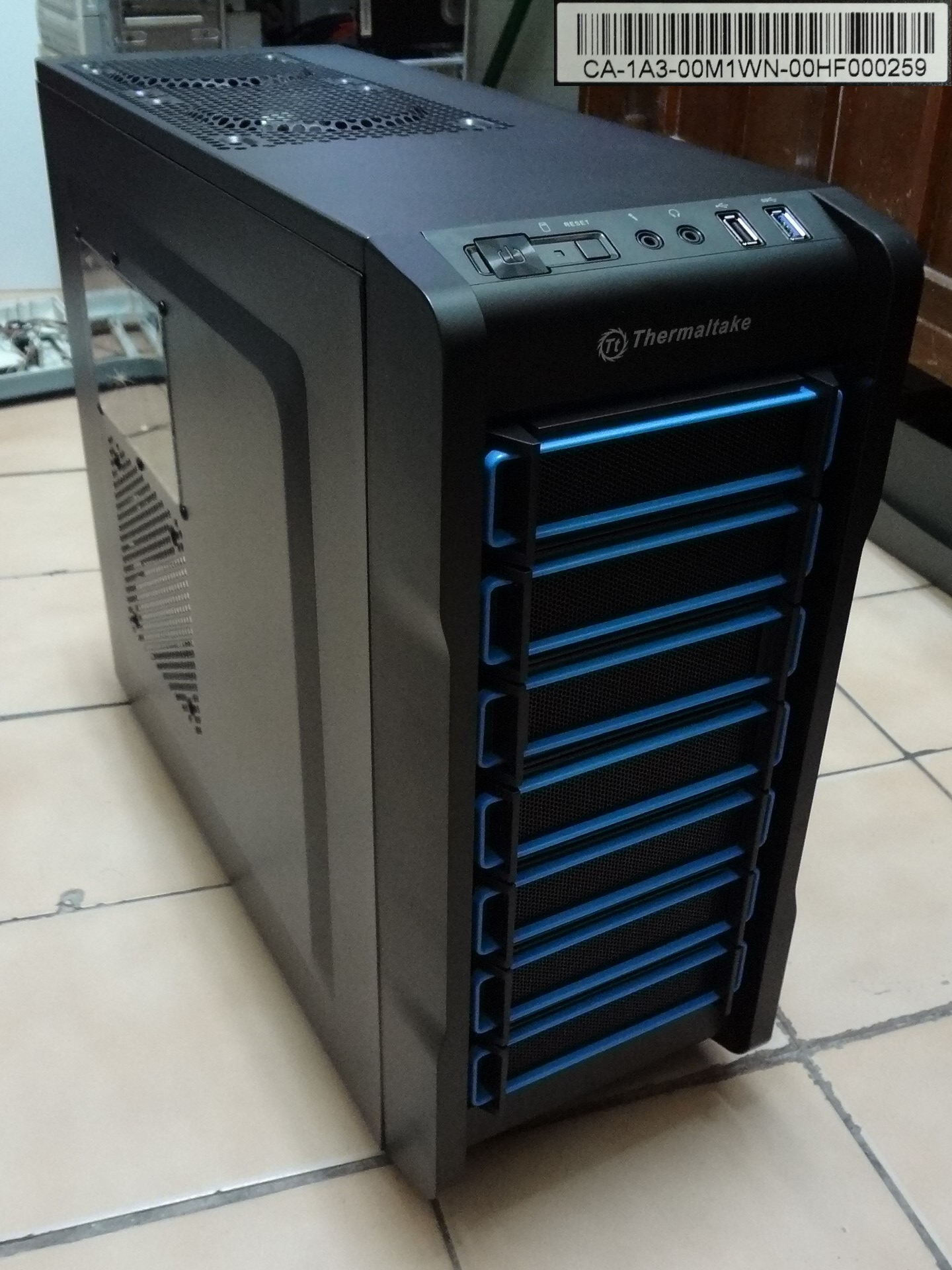 曜越科技電腦機殼Chaser A21正面外觀。